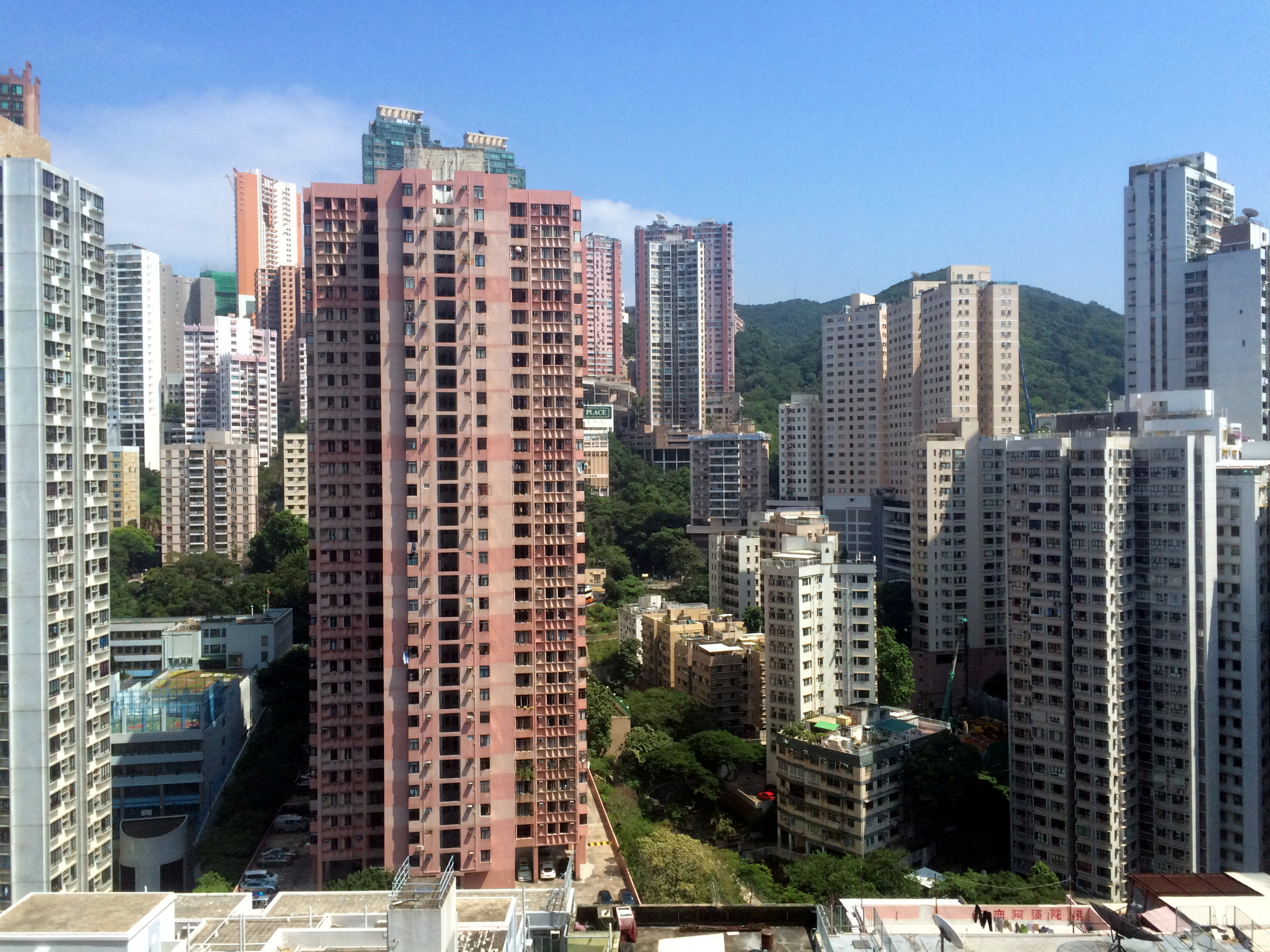 Braemar Hill Apartments